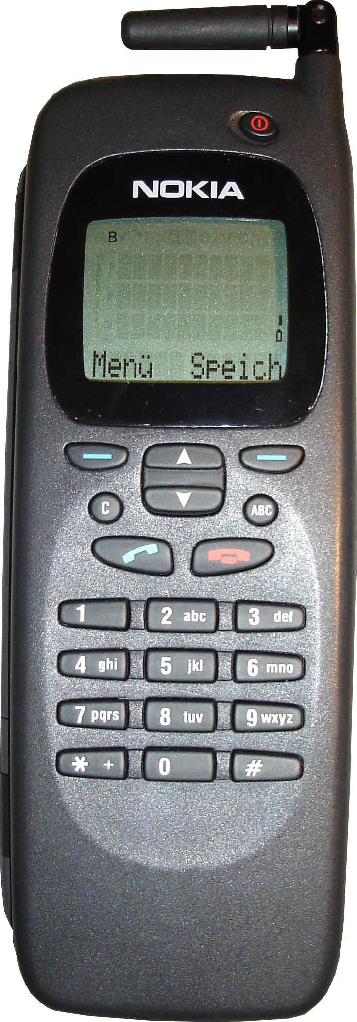 Nokia Communicator 9000 geschlossen, (c) L. Hüttner, 21.02.2006